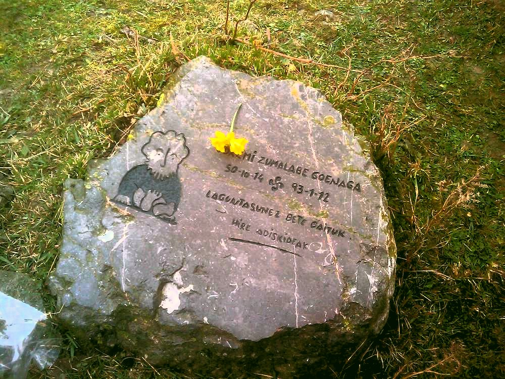 Joxemi Zumalaberen oroigarria, Larraitz (Gipuzkoa)